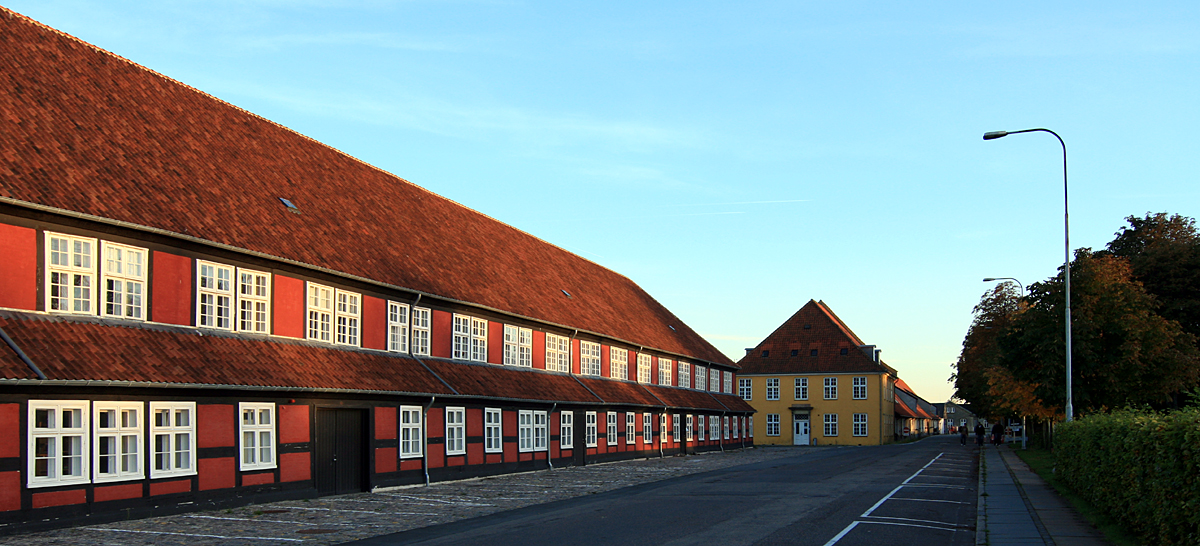 Fra Nyholm, Holmen, København.